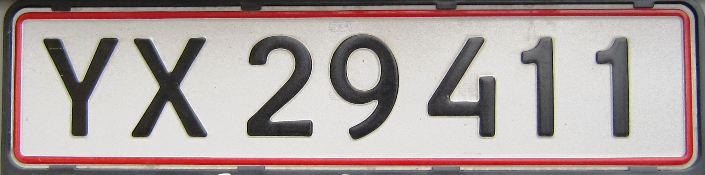 Denemarken kenteken wit oud